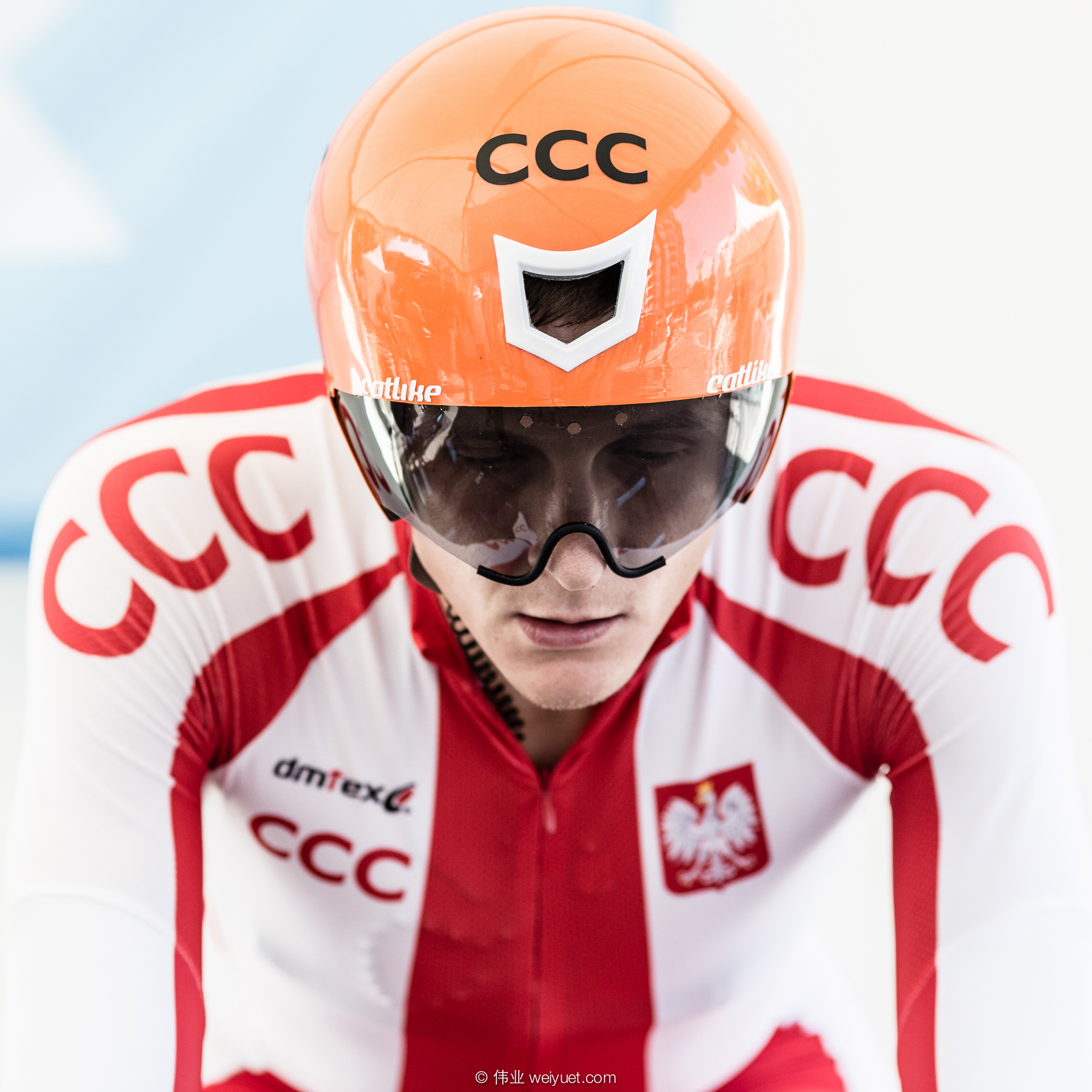 ITT Men's Elite